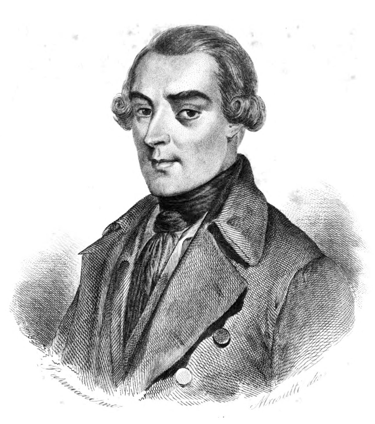 Carlo Tenivelli